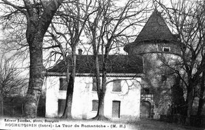 Château de Romanèche, Rochetoirin, Isère, France. Carte postale ancienne.